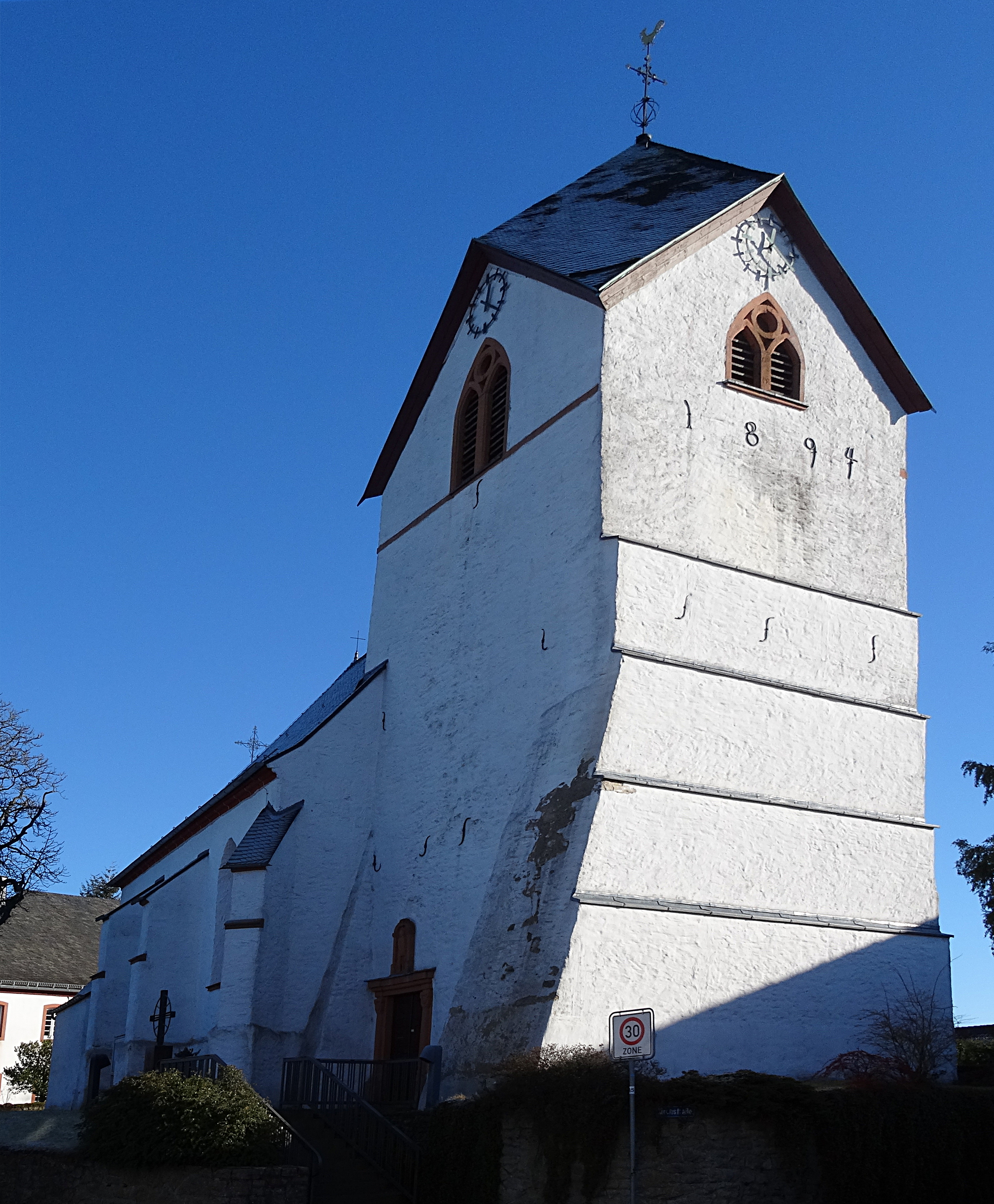 Denkmalgeschützte Kirche in Ripsdorf